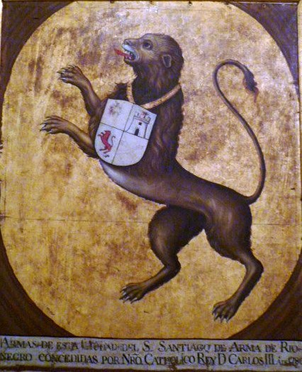 Primer Escudo otorgado a la Ciudad por don Carlos III Rey de España en 1774